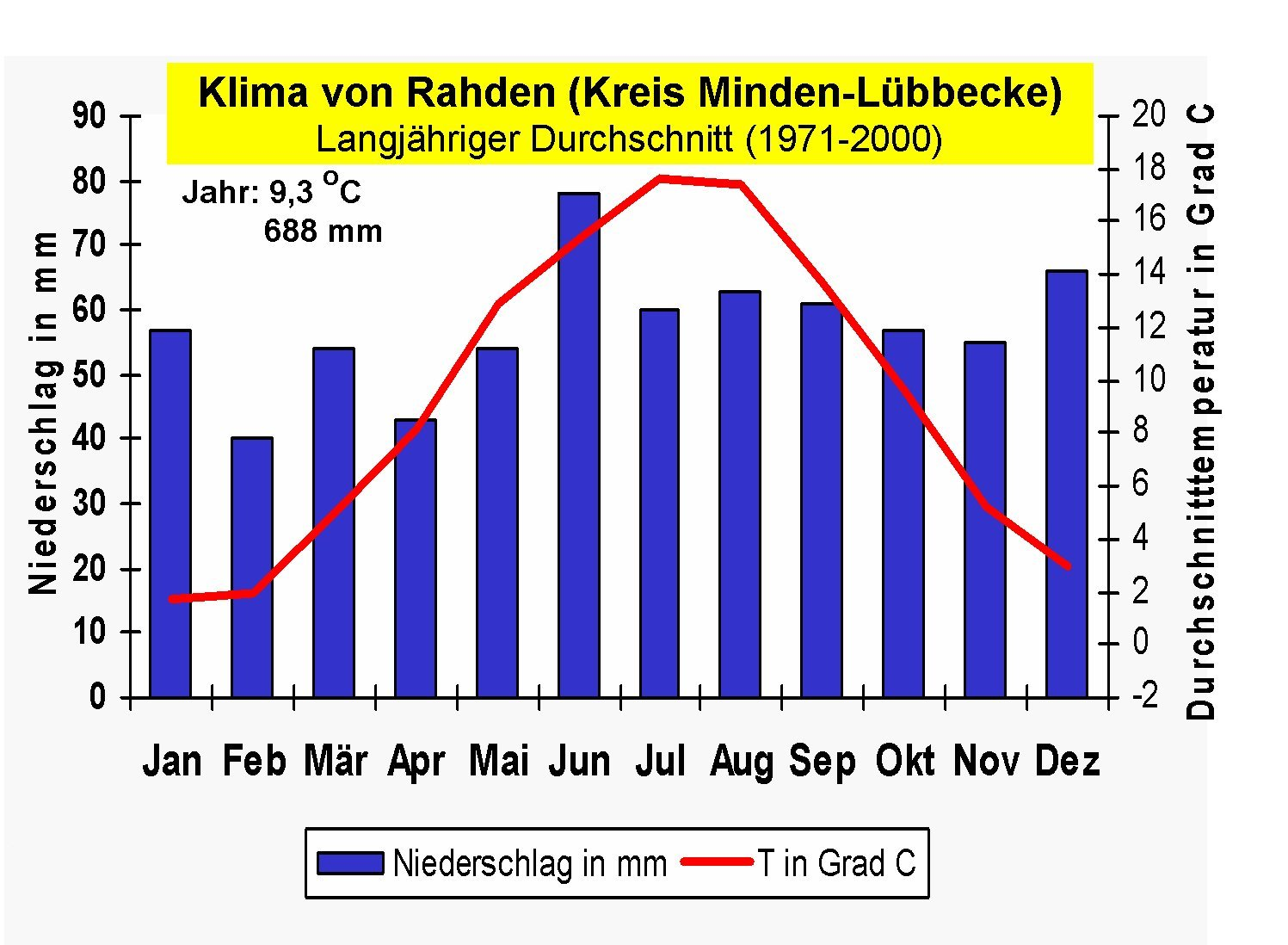 Klimadiagramm von Rahden, Nordrhein-Westfalen, Deutschland.